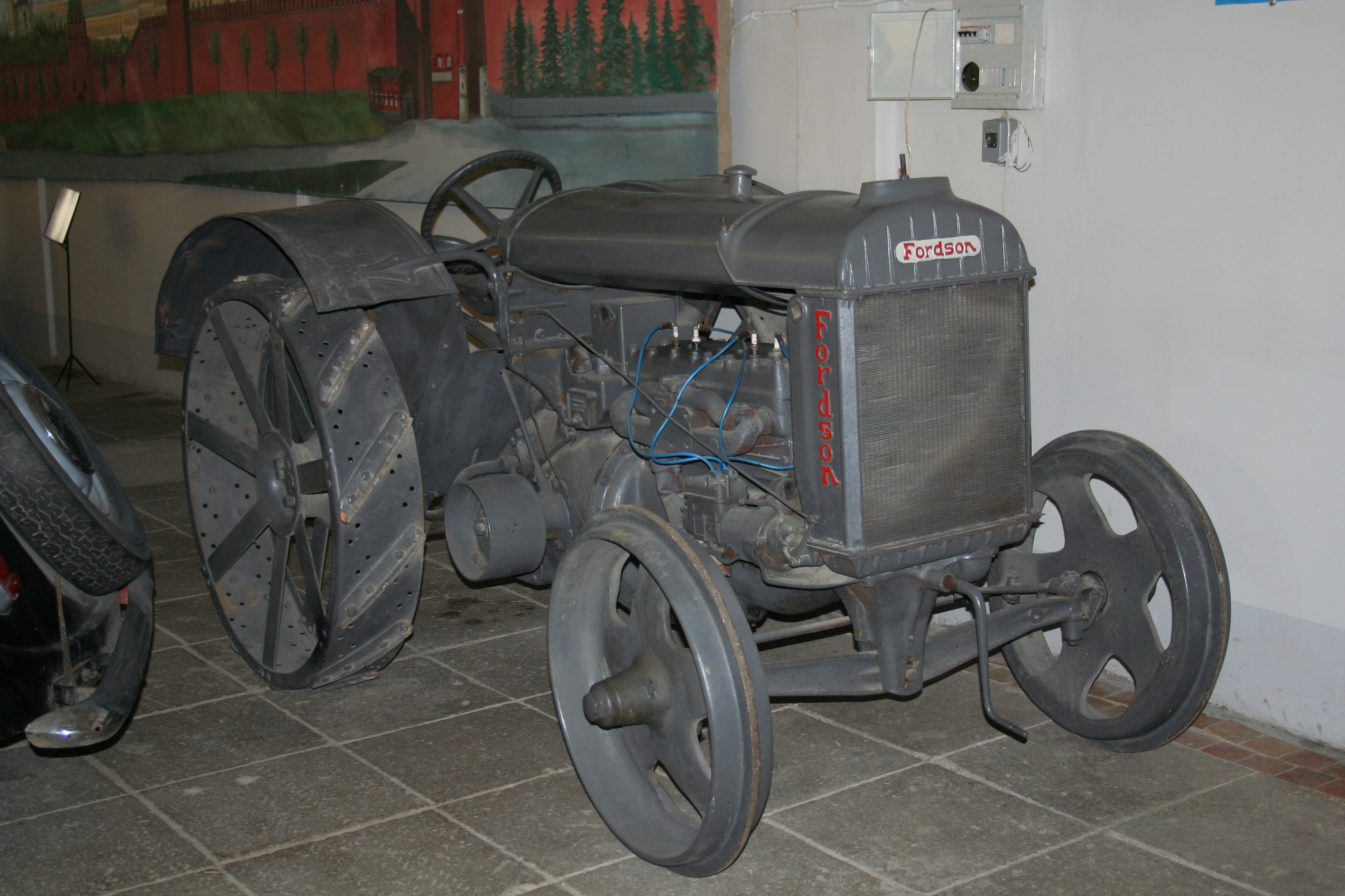 Museum auf dem Gelände des Filmstudios Mosfilm in Moskau. Die Exposition. Ein Fordson-Traktor, Baujahr 1913.